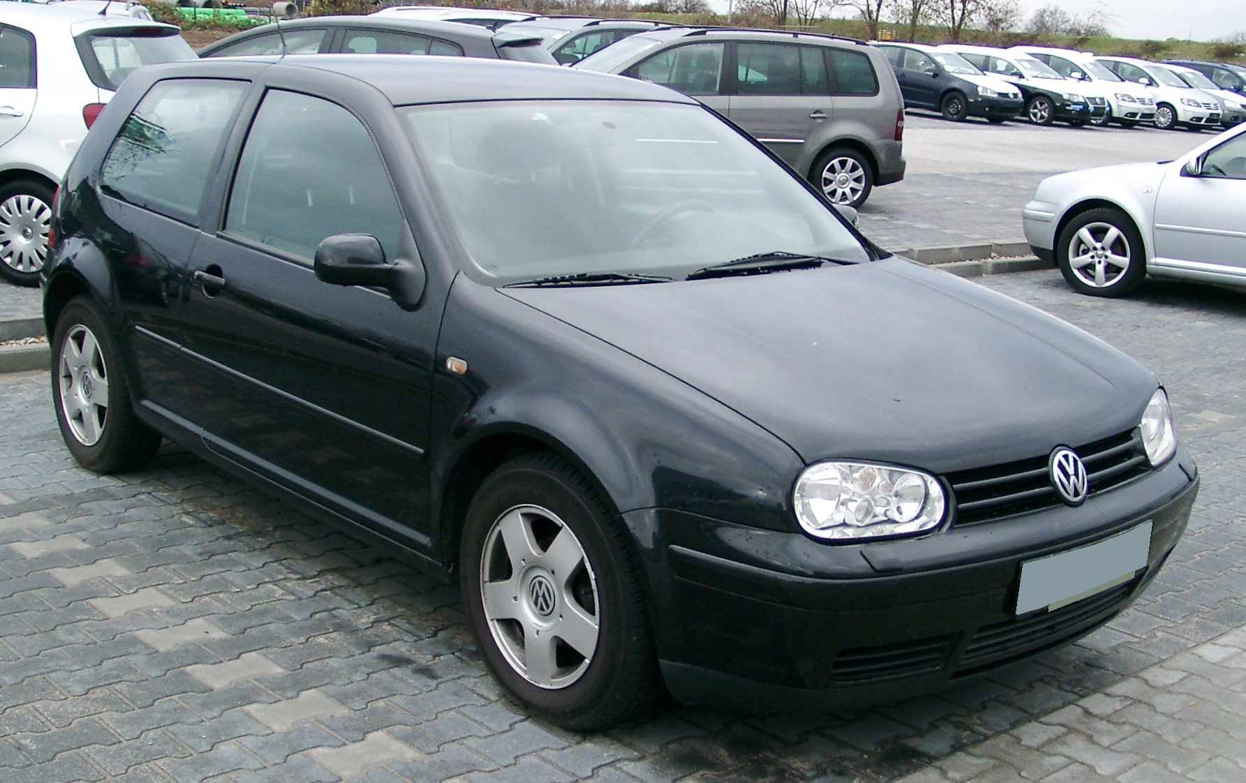 VW Golf IV